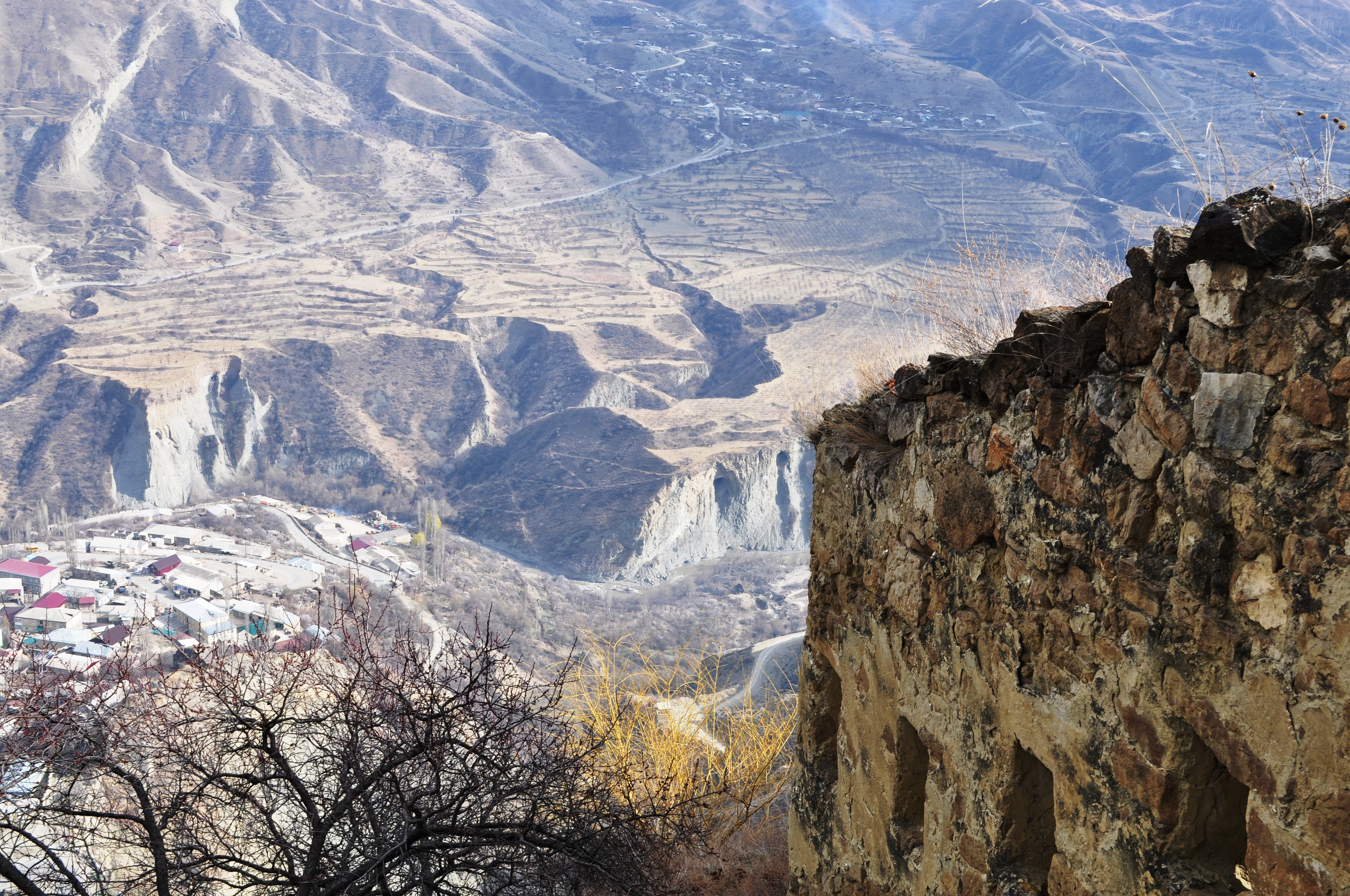 Крепостная стена (Республика Дагестан, Буйнакск, село Гуниб)